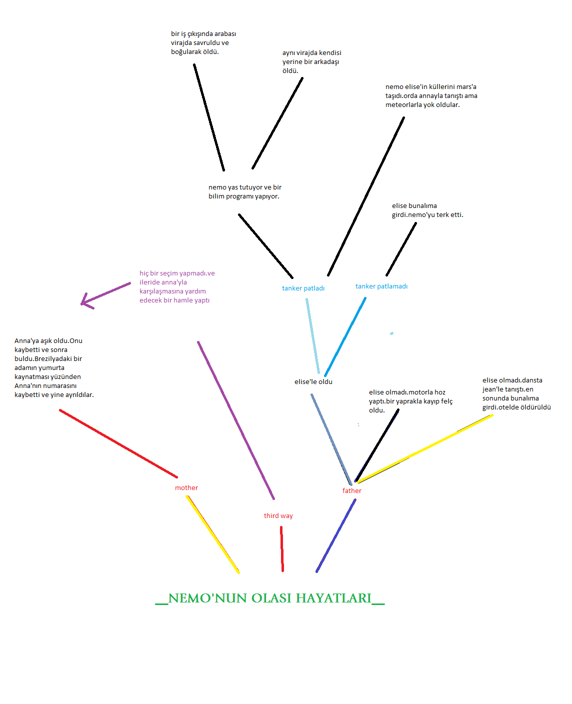 Mr. Nobody'deki ana karakterin yaptığı seçimlere göre olası hayatları